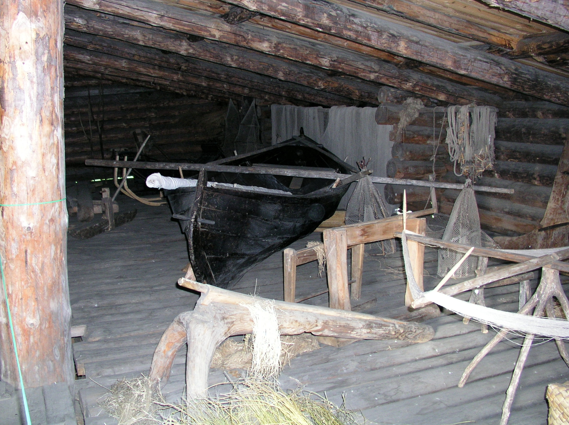 ein altes Fischerboot ("Kishanka") auf dem Boden eines Bauernhauses